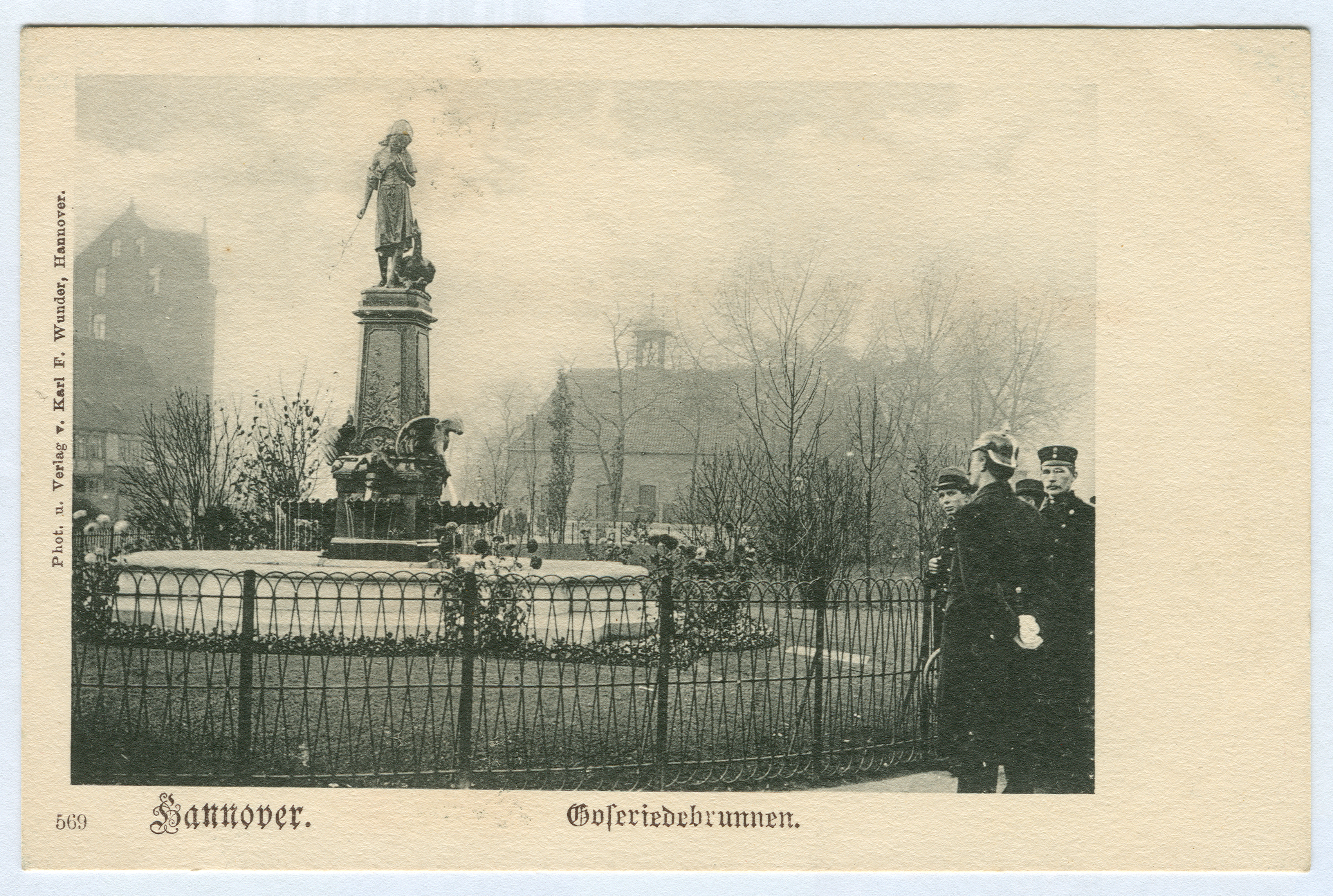 Der Gänseliesel-Brunnen an seinem ursprünglichen Standort an der Goseriede